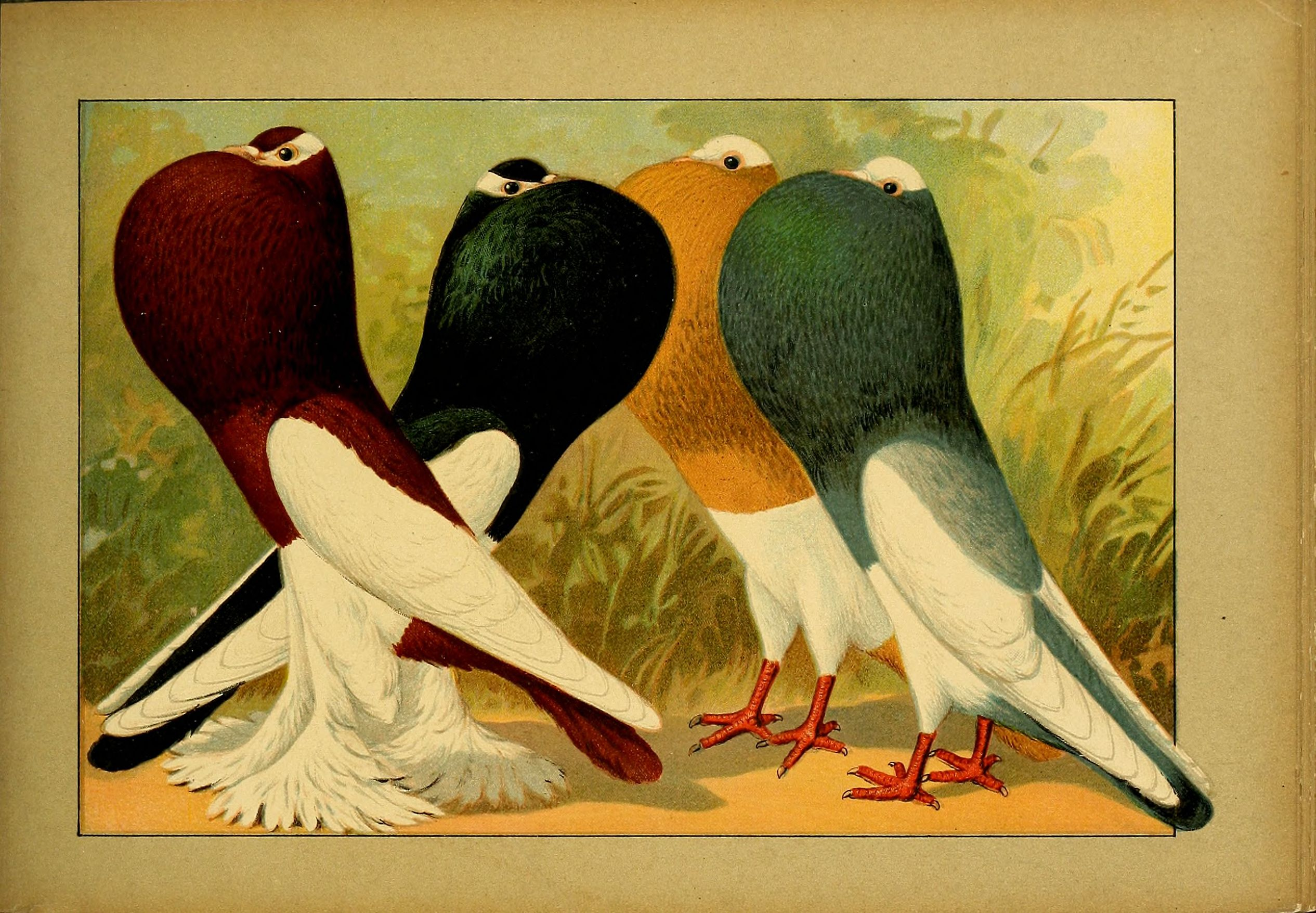 Deutsch